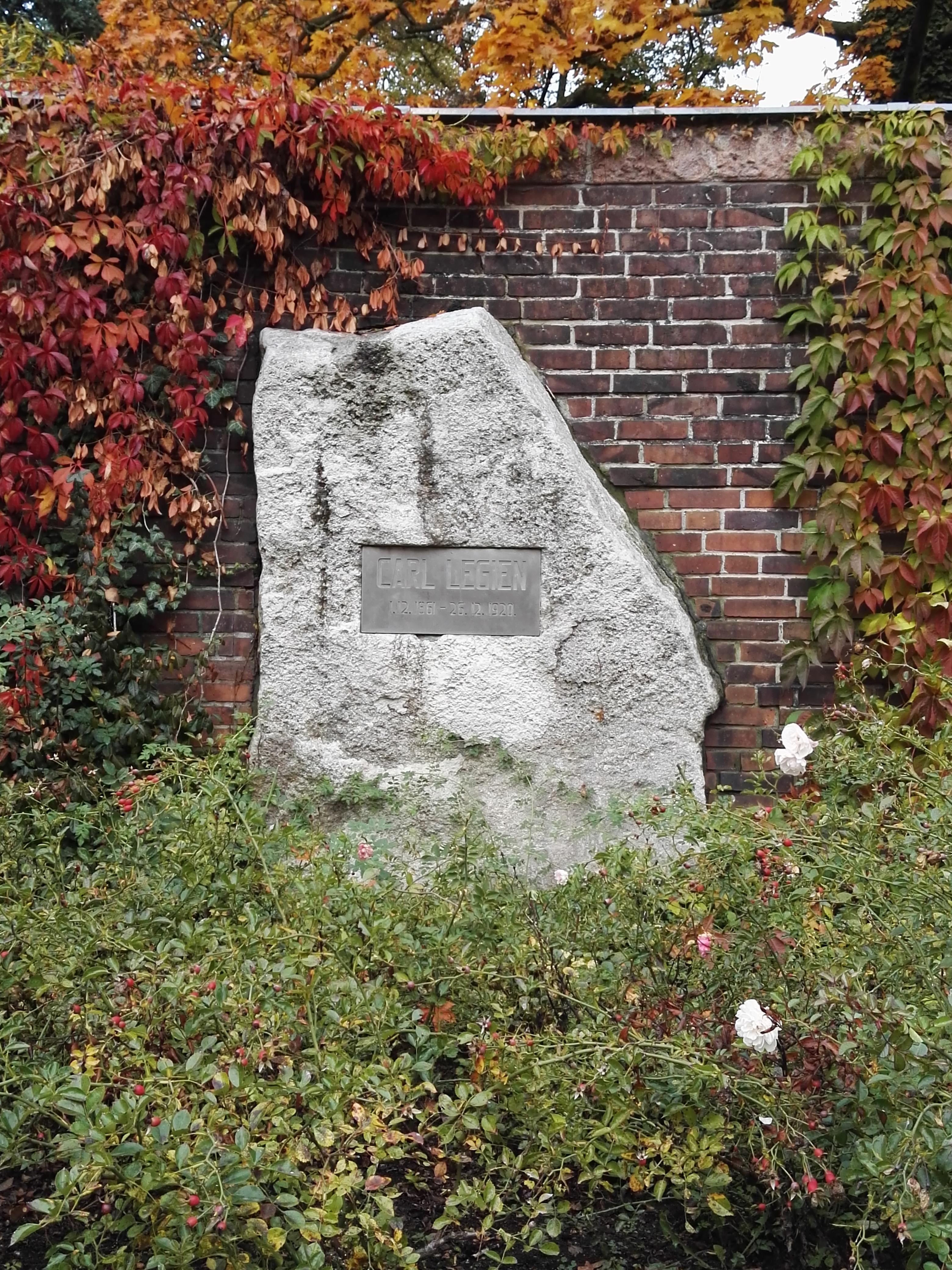 Grab von Carl Legien in der Gedenkstätte der Sozialisten auf dem Zentralfriedhof Friedrichsfelde in Berlin-Lichtenberg